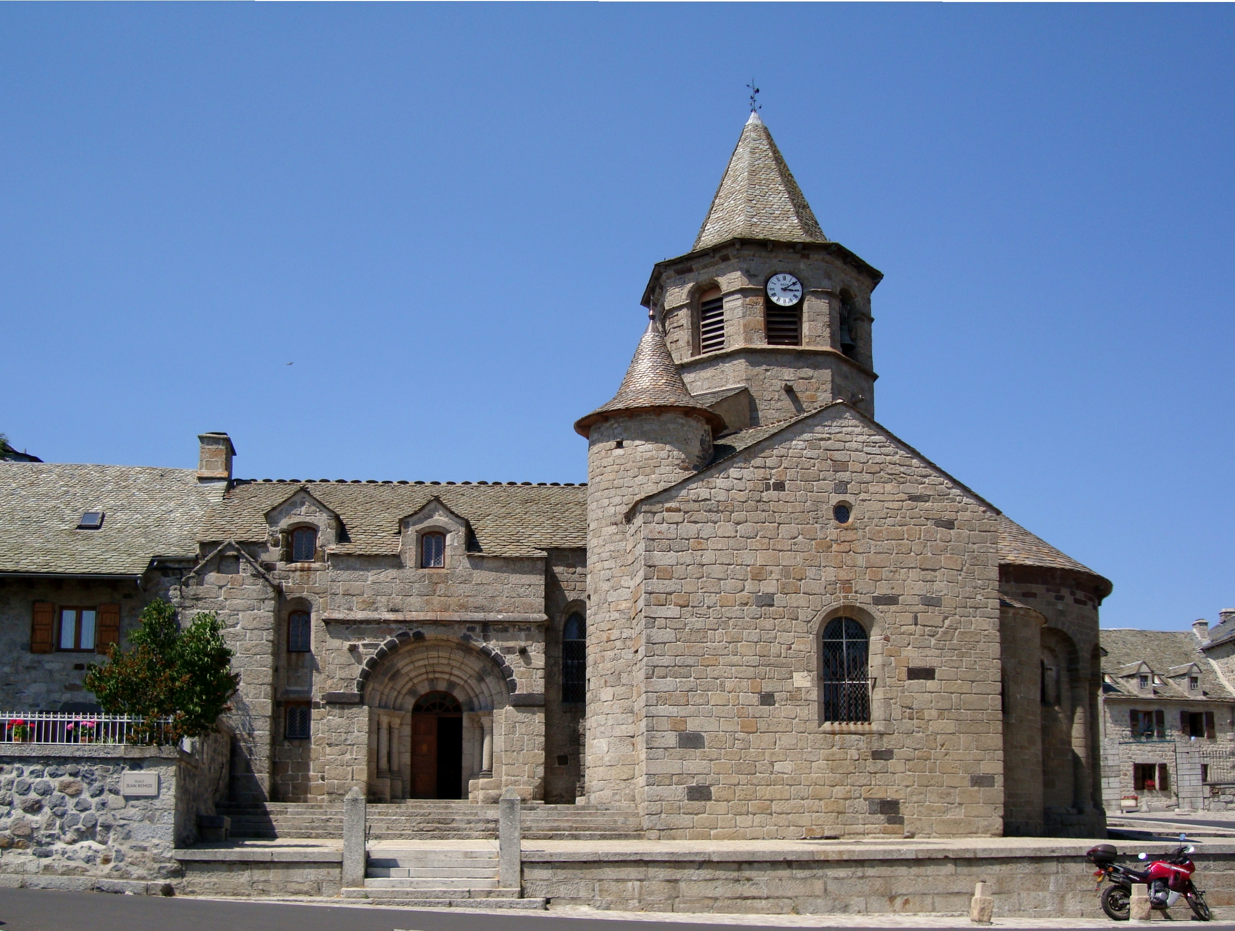 L'église de Nasbinals (Lozère, France).